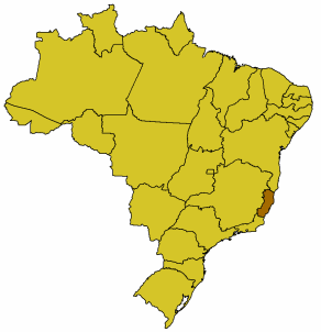 Karte Brasiliens, Espírito Santo hervorgehoben, GFDL nach der Vorlage Bild:Brasilien Bundesstaaten.png